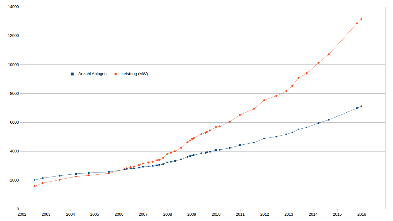 Installierte Windkraft-Anlagen und deren Leistung von Nordex